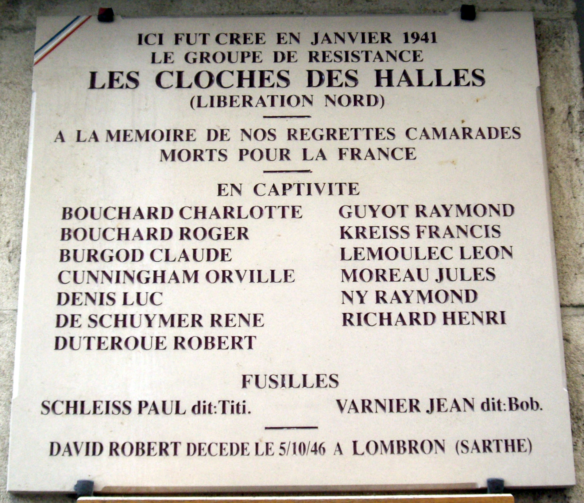 Plaque apposée au n° 14 de la rue Sauval, Paris 1er, où fut créé le groupe de résistance « Les Cloches des Halles » (Libération-Nord) en janvier 1941.